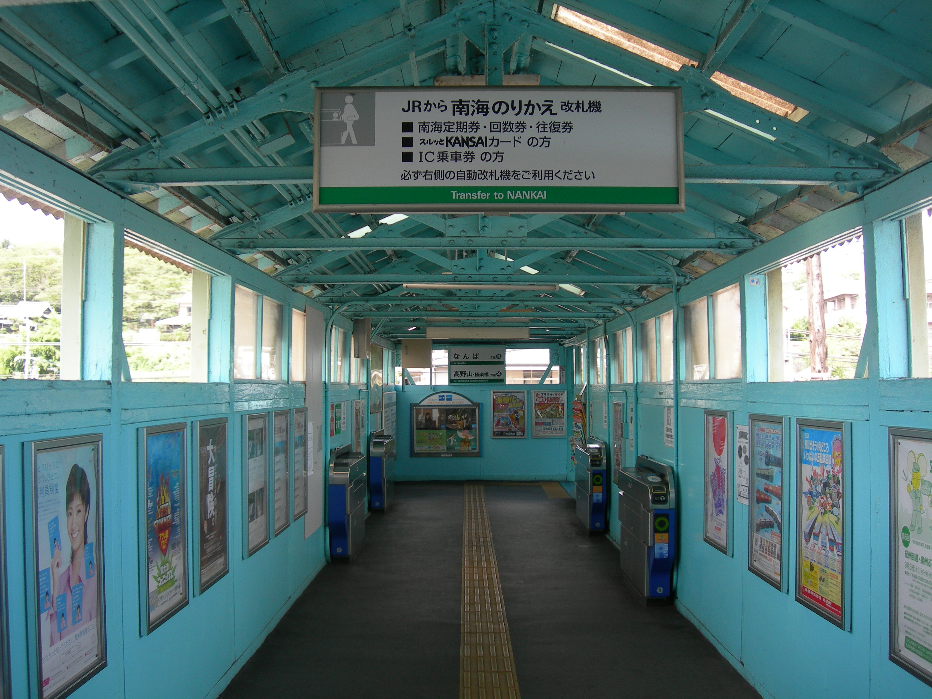 橋本駅 (和歌山県)跨線橋の通路にある簡易自動改札機